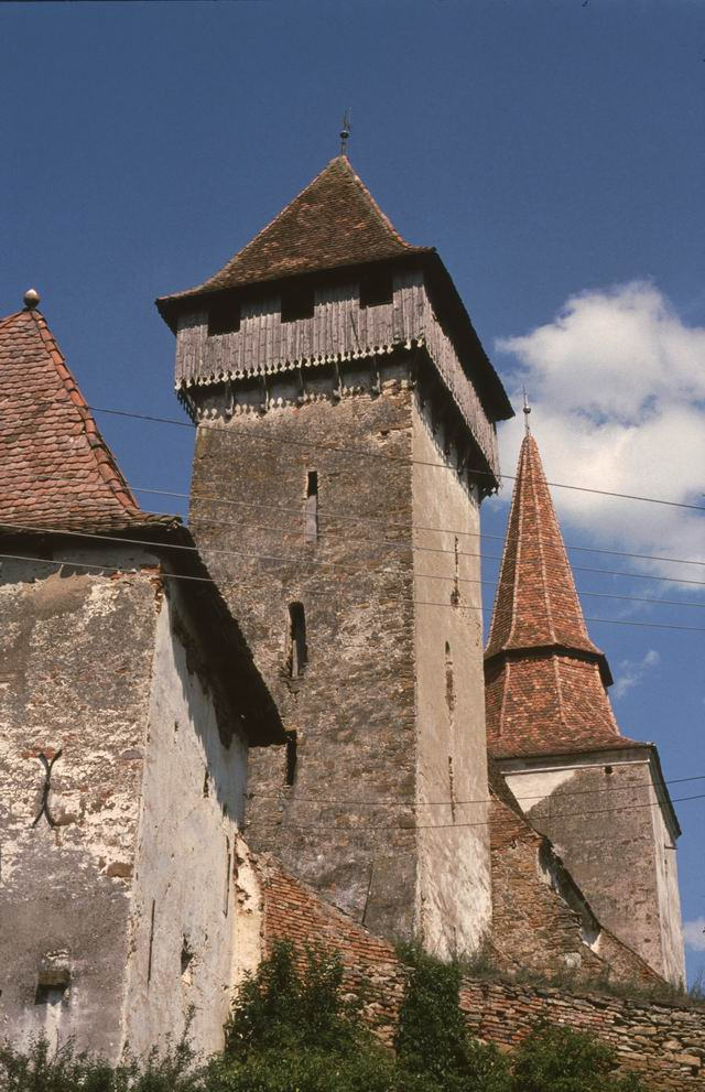 Kirchenburg Hundertbücheln (Movile) (1993)